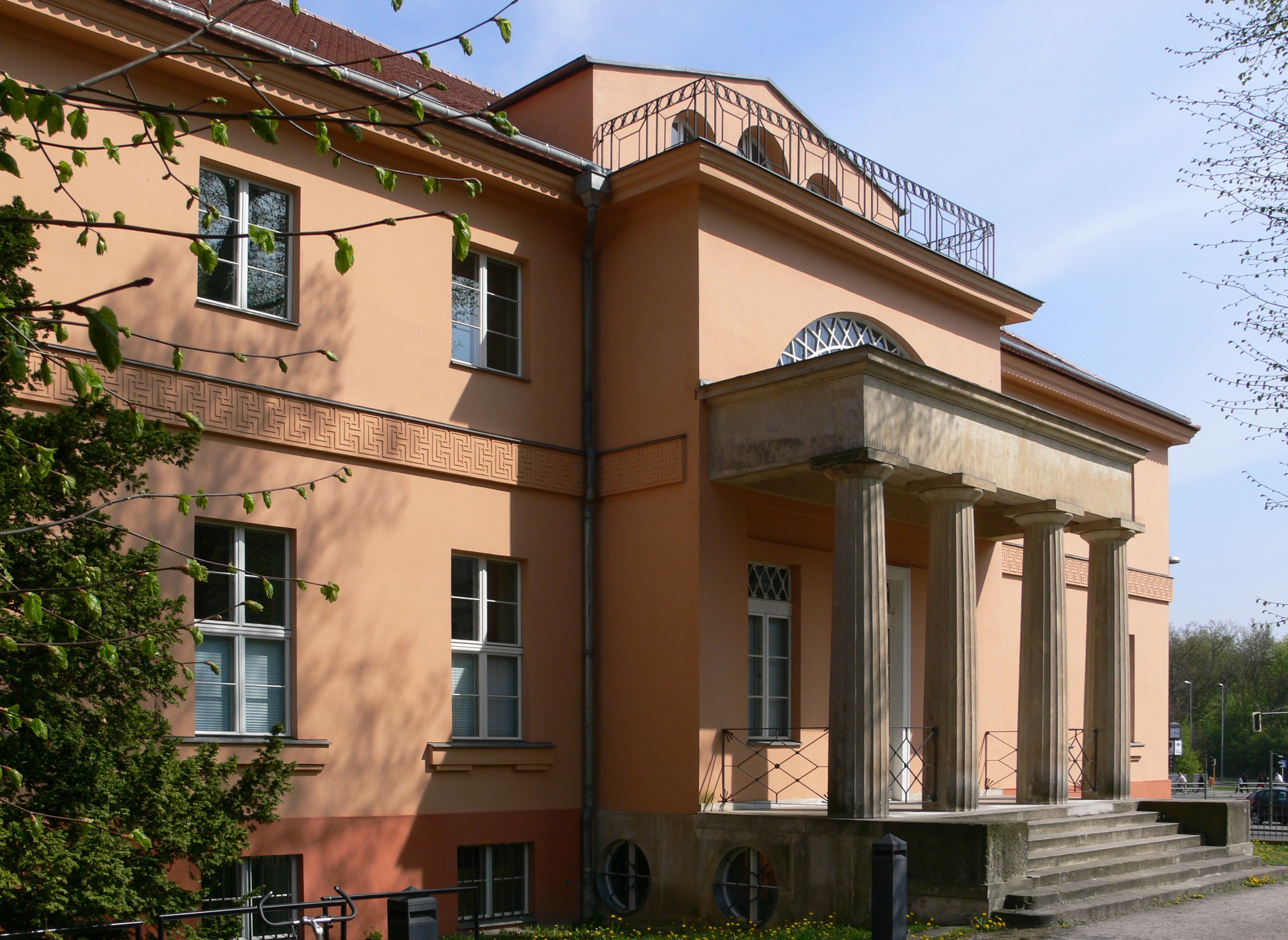 Berlin-Steglitz, Gutshaus Steglitz (Wrangelschlösschen)